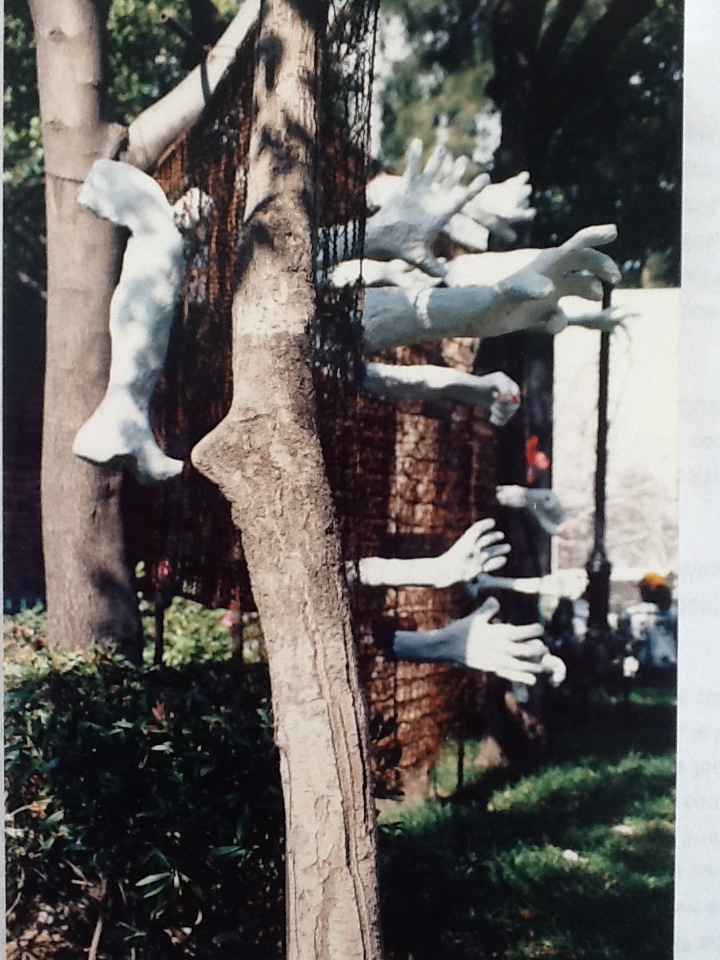 "De Paso" Escultura en la Plaza de las Vizcaínas, Ciudad de México. 2004